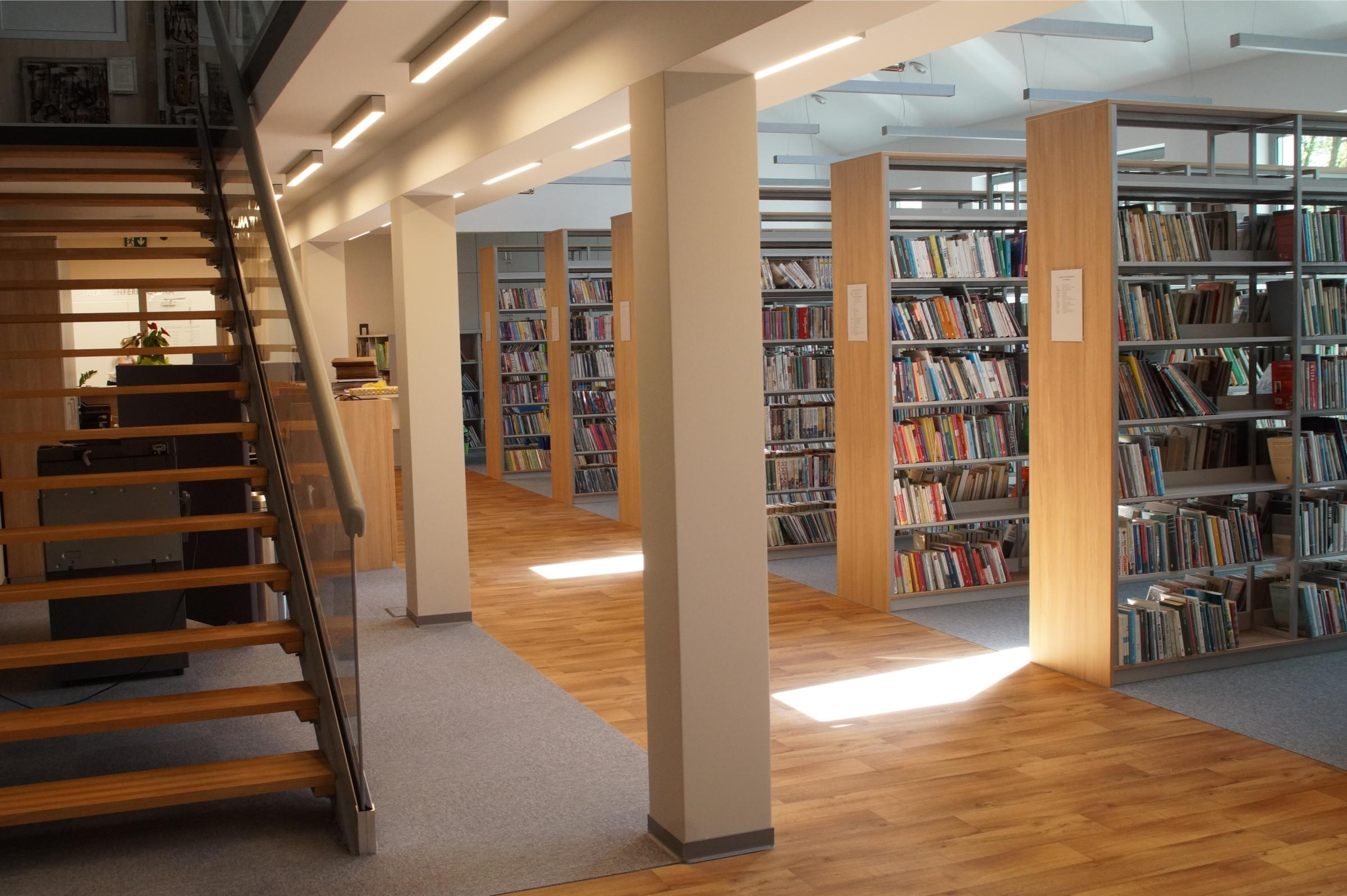 Gminna Biblioteka Publiczna, budynek Gminngo Centrum Kultury w Kłodawie, ul. Jeziorna 8